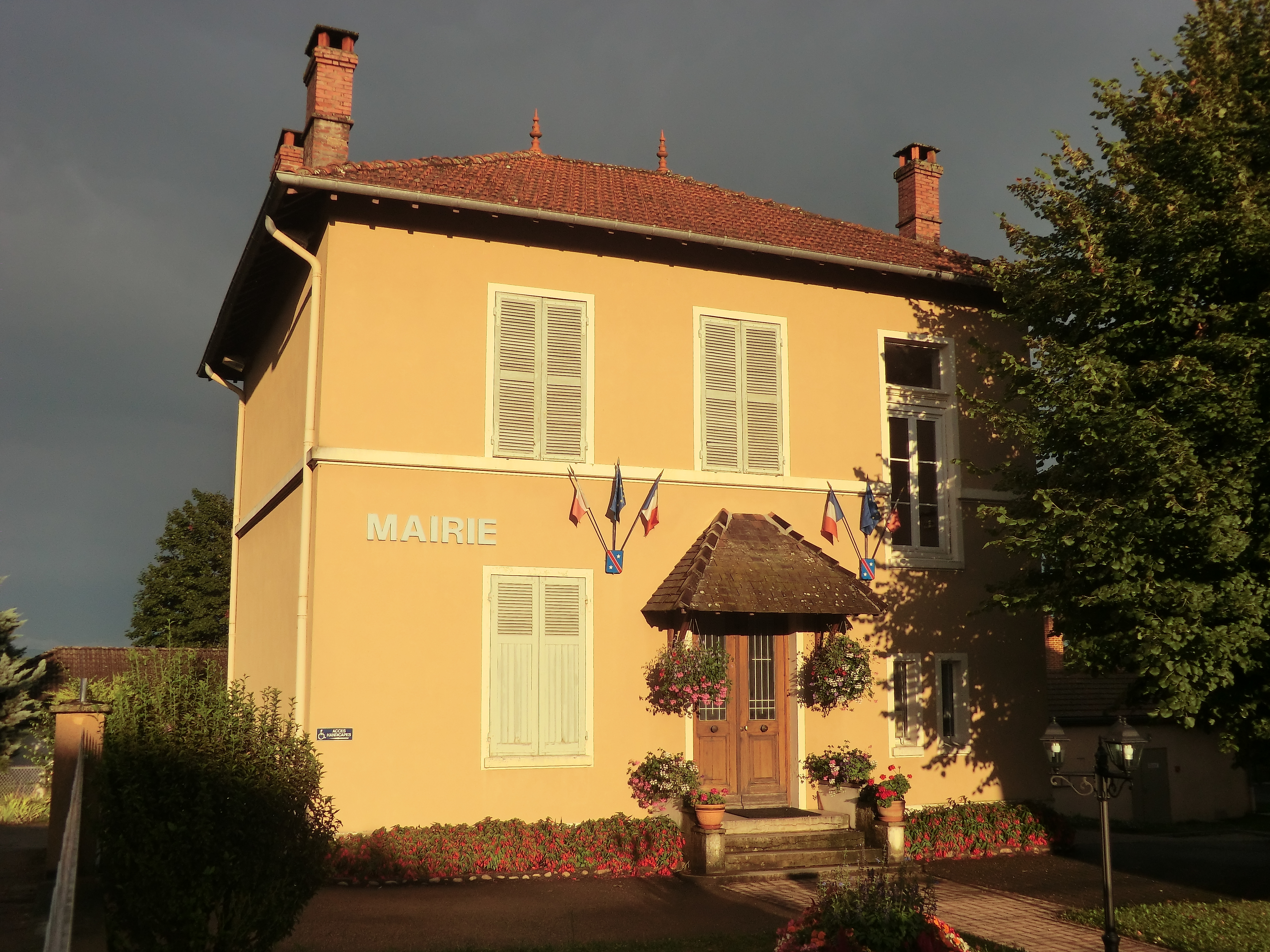 Mairie de Rignieux-le-Franc.